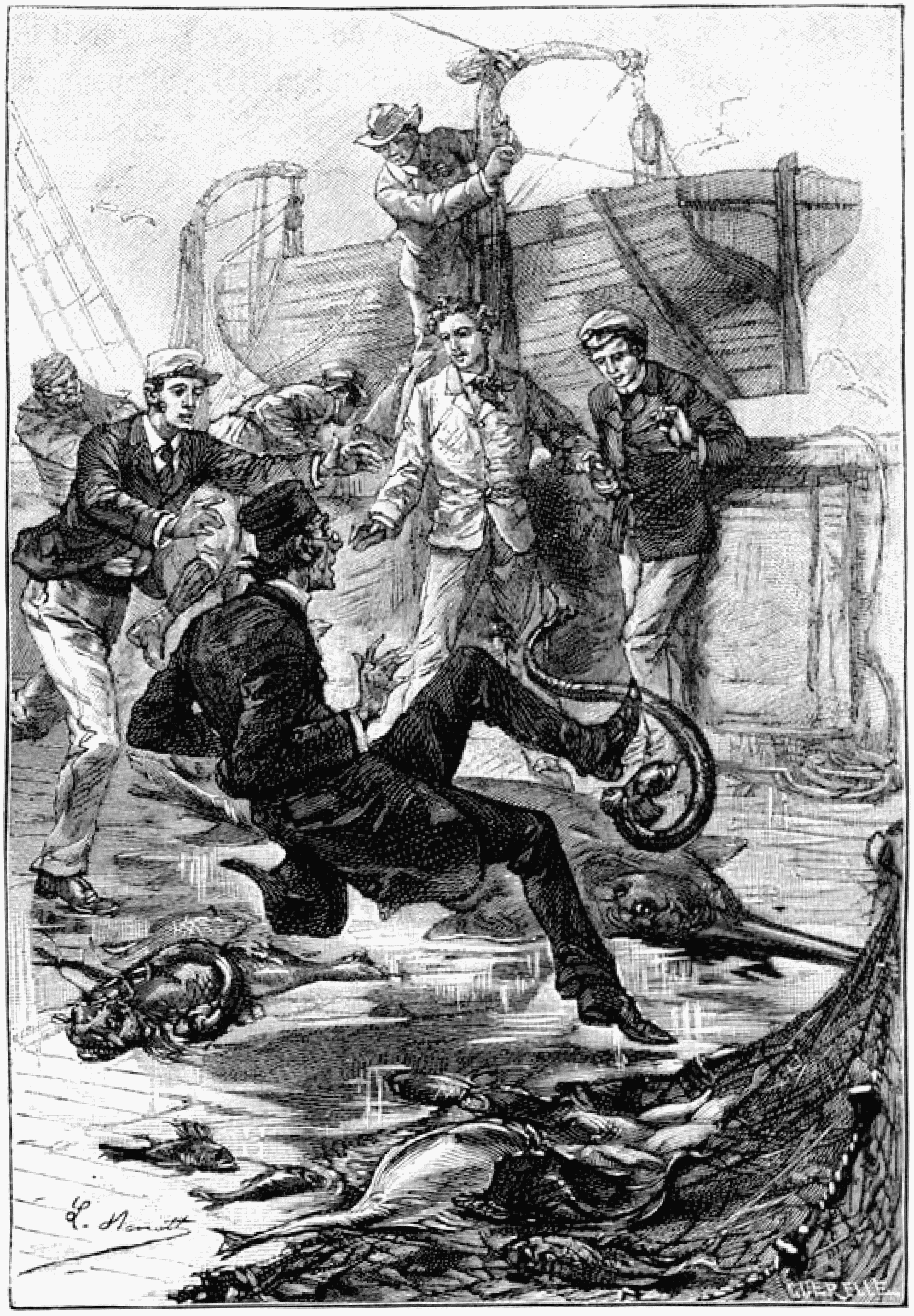 Bourses de voyage : M. Horatio Patterson, avant que Will Mitz eut pu le retenir, ayant eu l’imprudence de saisir à pleine main une de ces gymnotes, une décharge électrique l’envoya rouler jusqu’à l’habitacle.